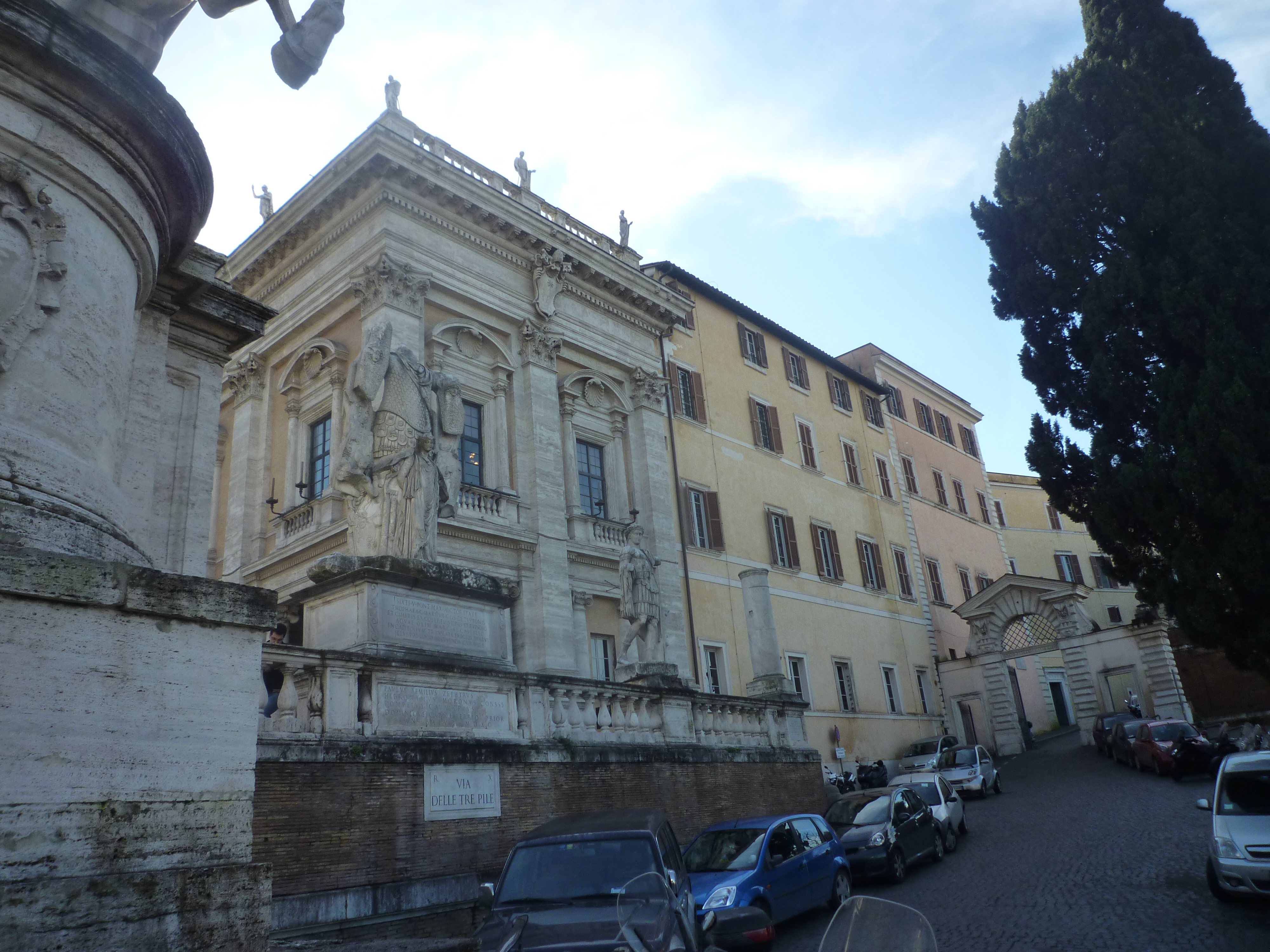 Campidoglio